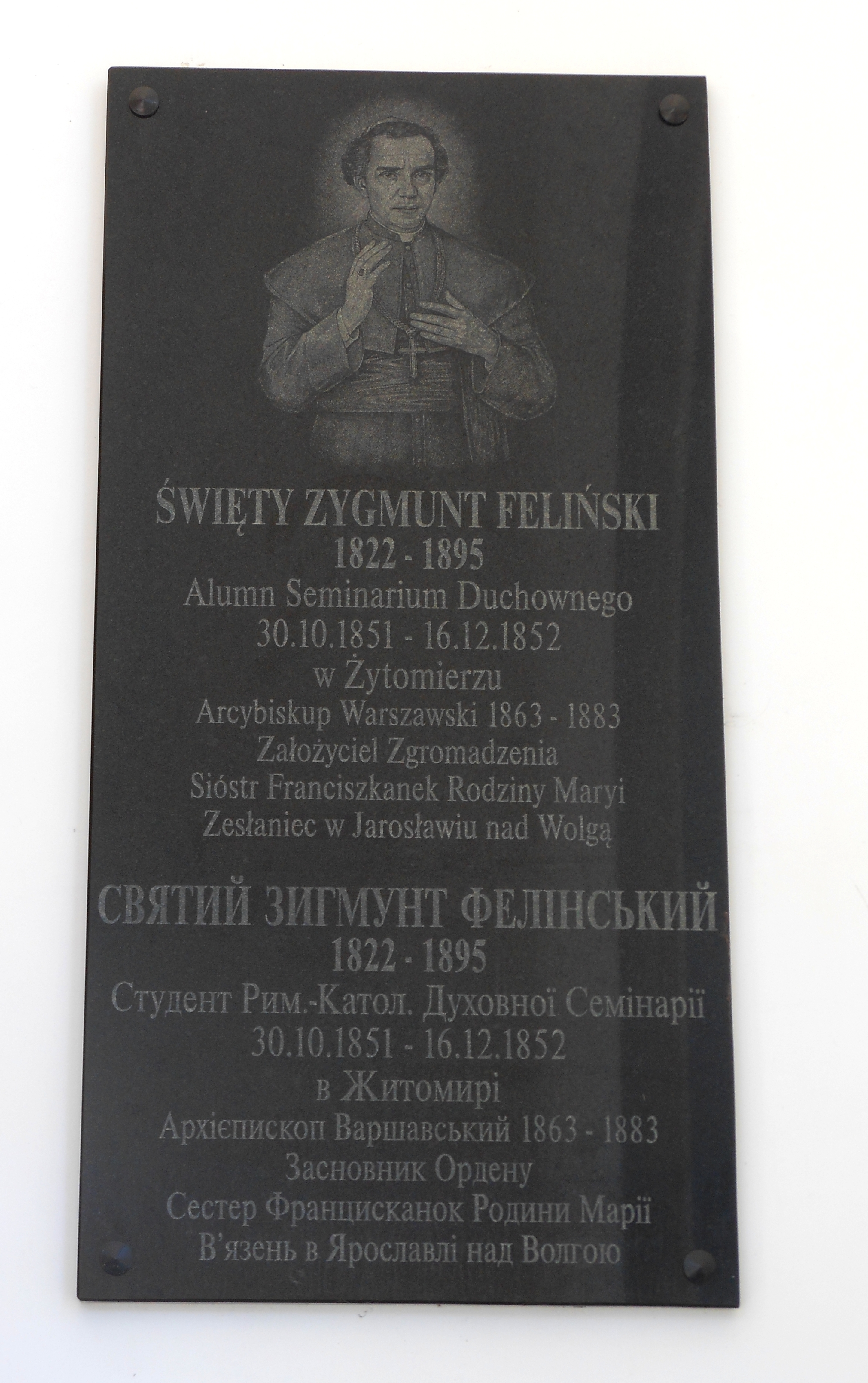 Семінарійський костел Св. Йоана з Дуклі, Житомир, вул. Київська,4